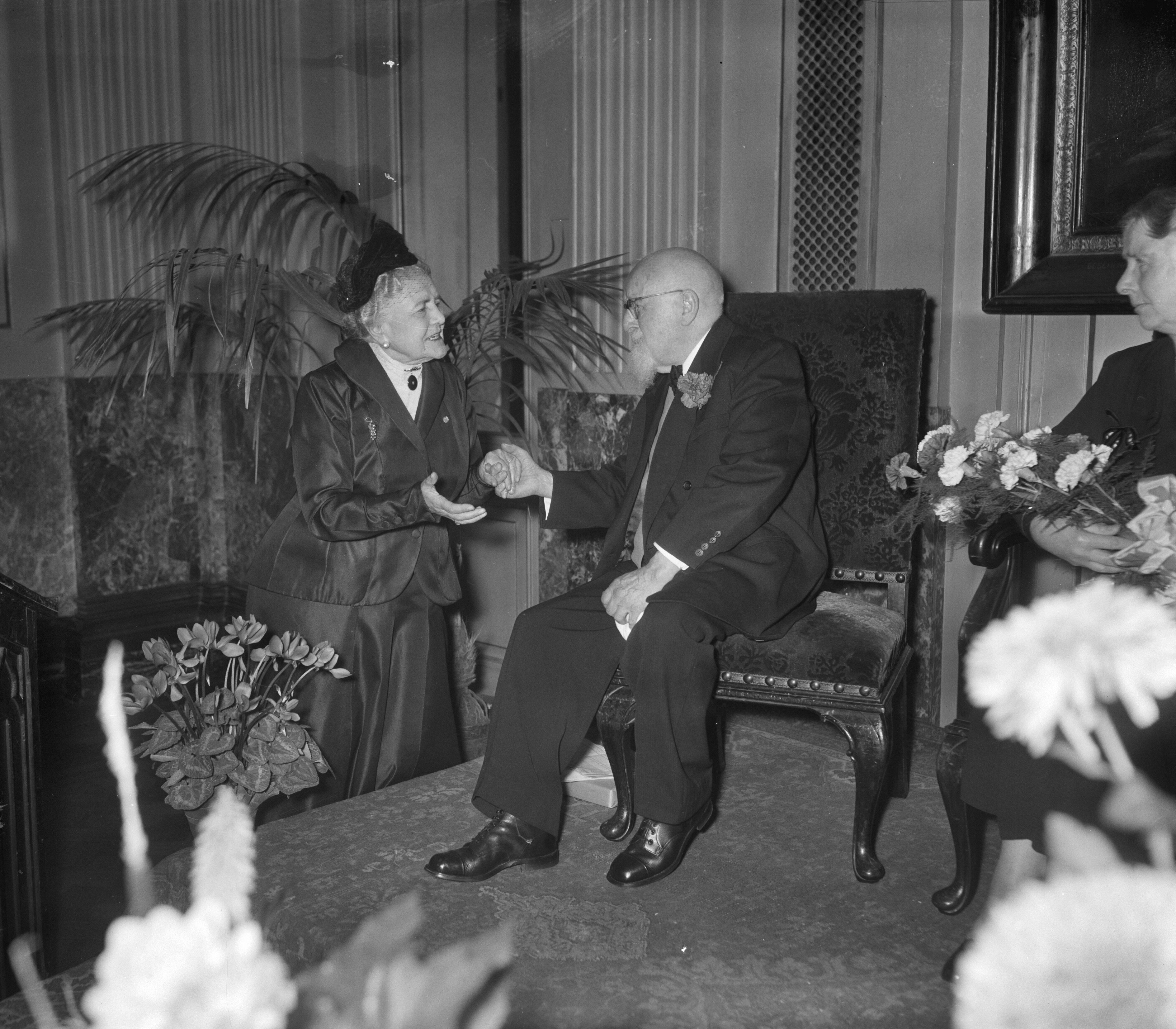 Collectie / Archief : Fotocollectie Anefo Reportage / Serie : [ onbekend ] Beschrijving : Acteur Mari van Warmelo 90 jaar. Receptie foyer Stadsschouwburg Amsterdam Annotatie : Hij wordt gefeliciteerd door actrice Rika Hopper Datum : 19 oktober 1956 Trefwoorden : acteurs, toneelspelers Persoonsnaam : Warmelo, Mari van Fotograaf : Pot, Harry / Anefo Auteursrechthebbende : Nationaal Archief Materiaalsoort : Negatief (zwart/wit) Nummer archiefinventaris : bekijk toegang 2.24.01.04 Bestanddeelnummer : 908-0892